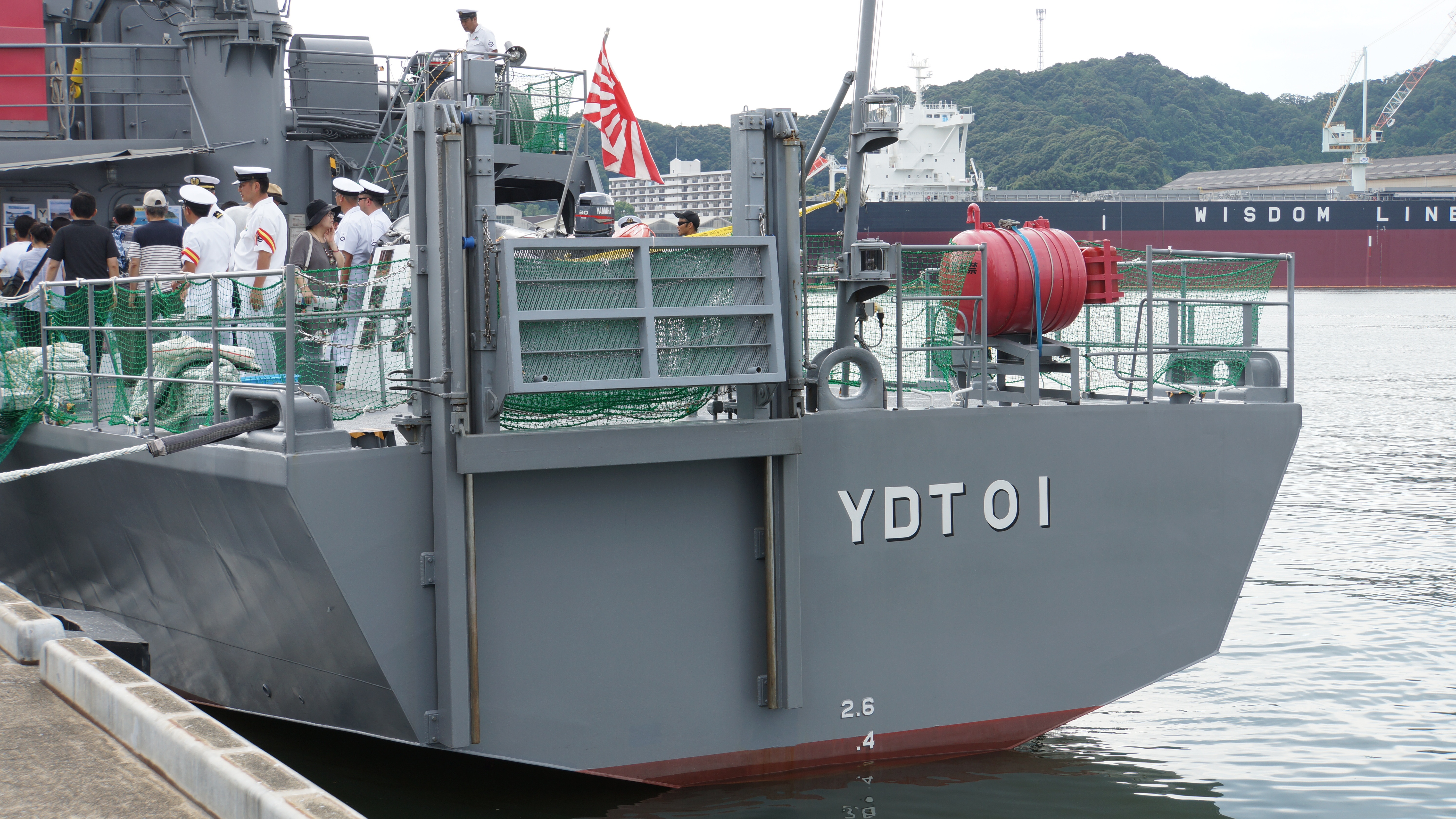 海上自衛隊 水中処分母船1号（YDT-01） 艦尾左側。2016年7月16日 舞鶴基地にて。